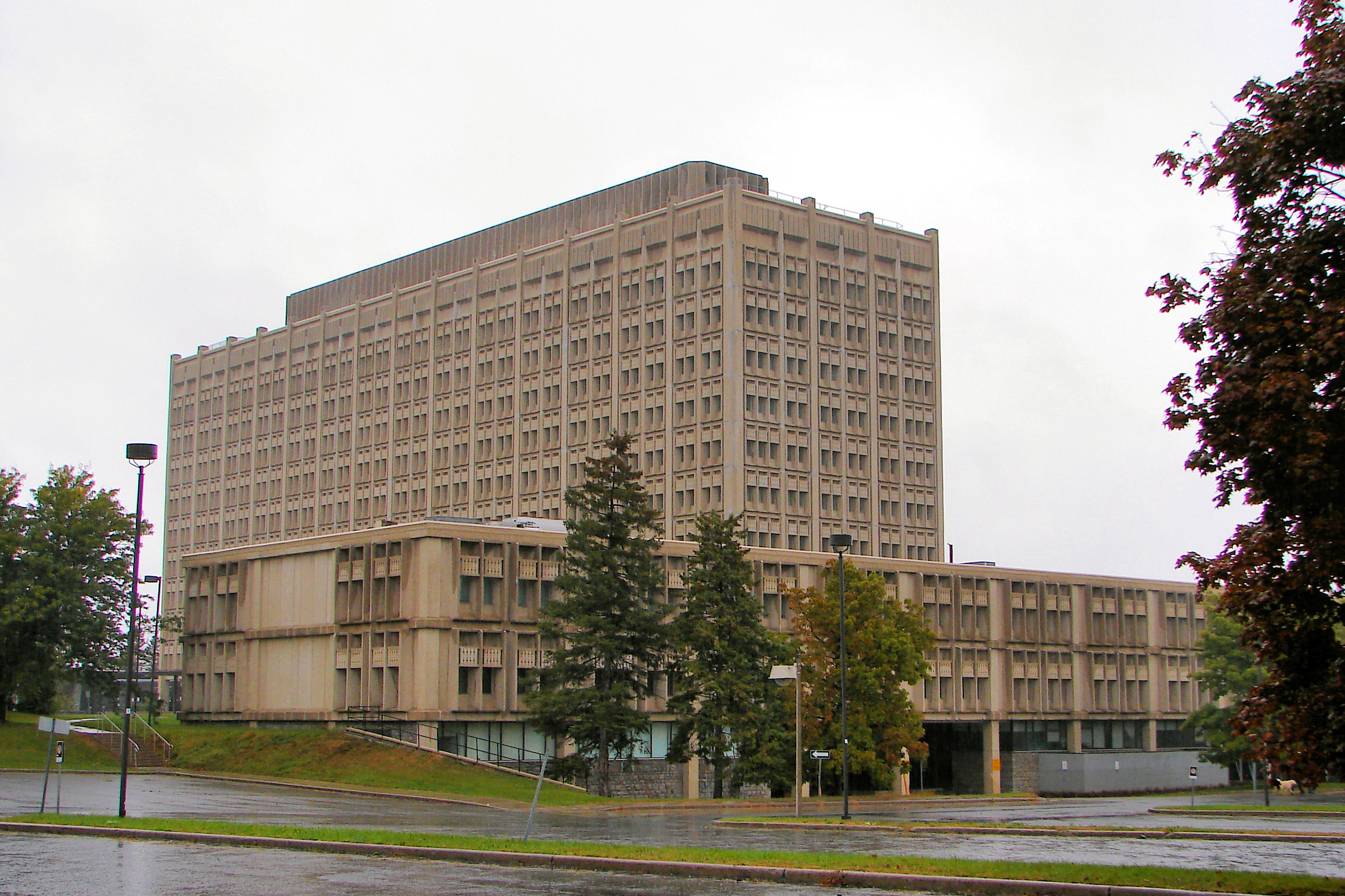 Carling Building, Ottawa, Ontario, Canada